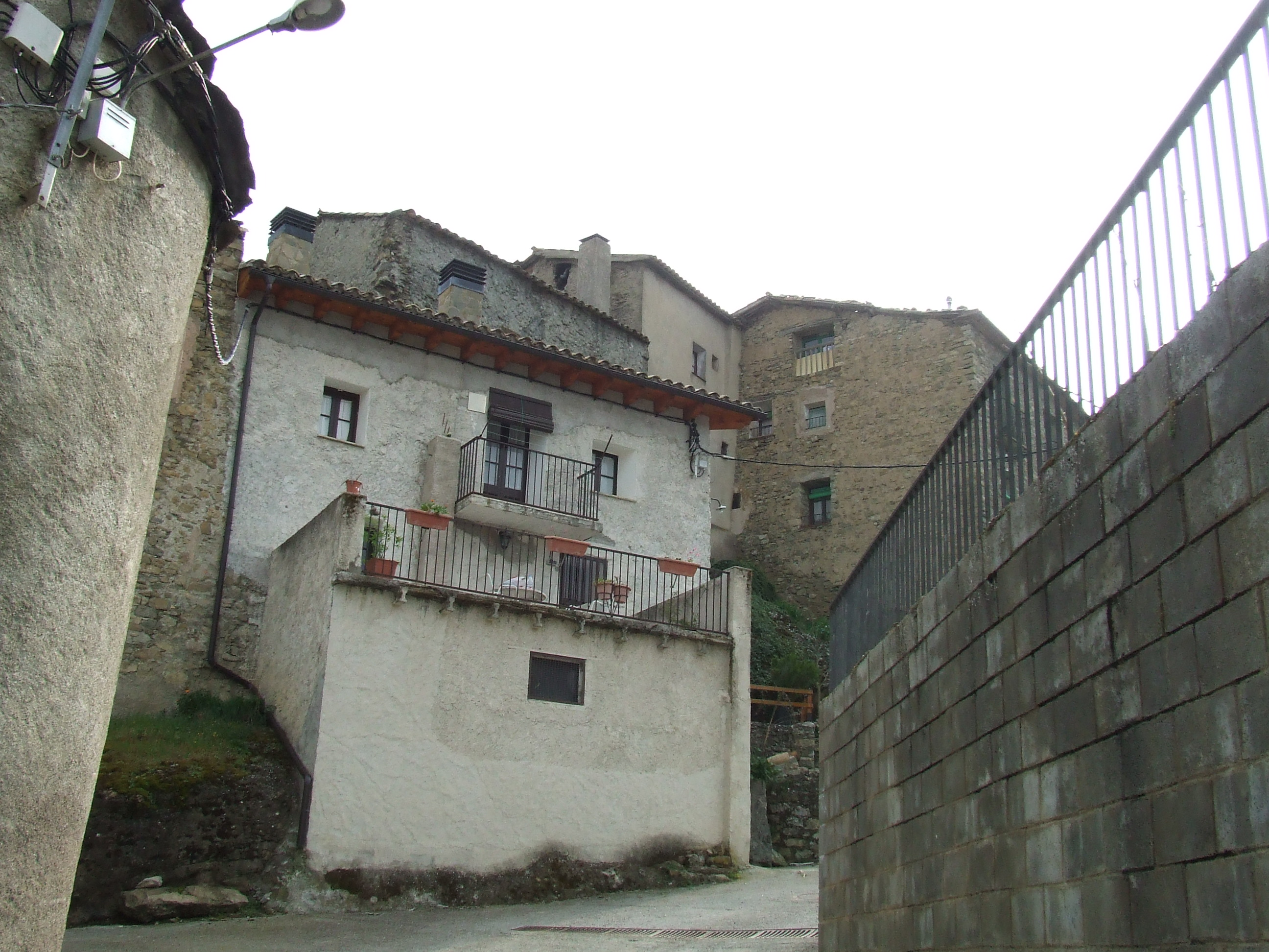 El nucli vell de Fígols de Tremp (Tremp, Pallars Jussà)